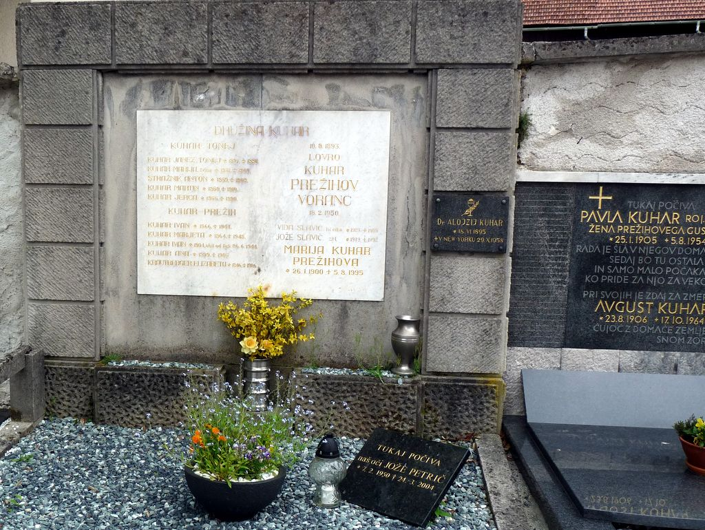 Grob Prežihovega Voranca v Kotljah